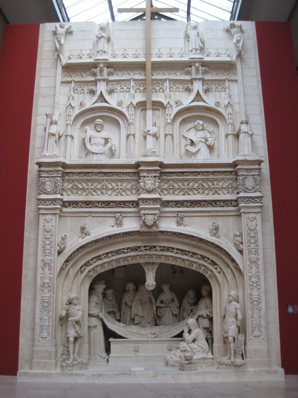 Cité de l'Architecture et du Patrimoine